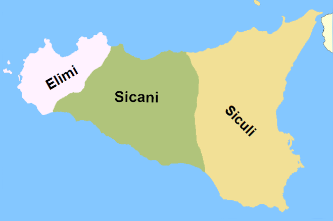 Cartina delle antiche popolazioni in Sicilia